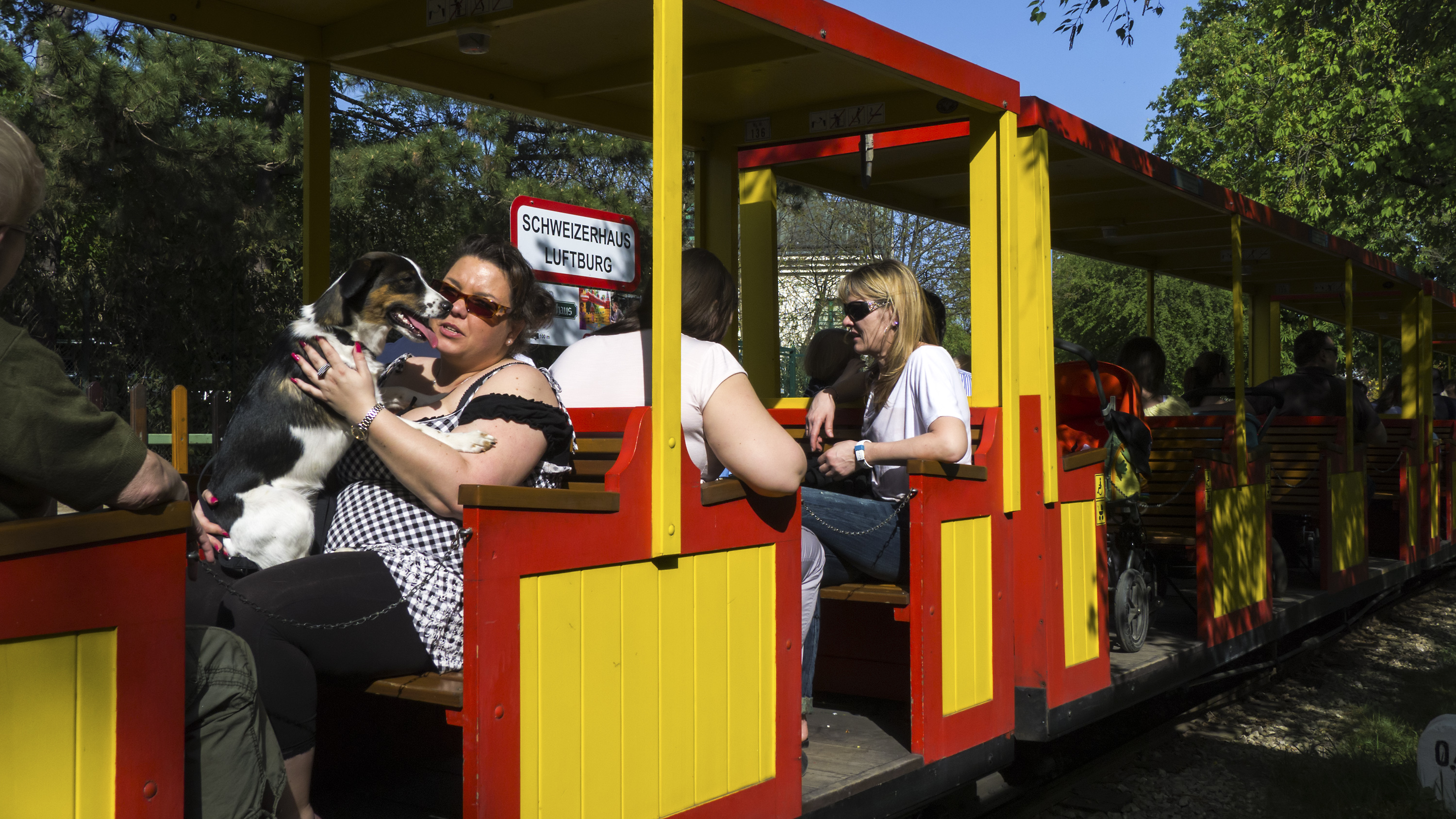 Liliputbahn im Wiener Prater in Wien 2, Station Schweizerhaus-Luftburg